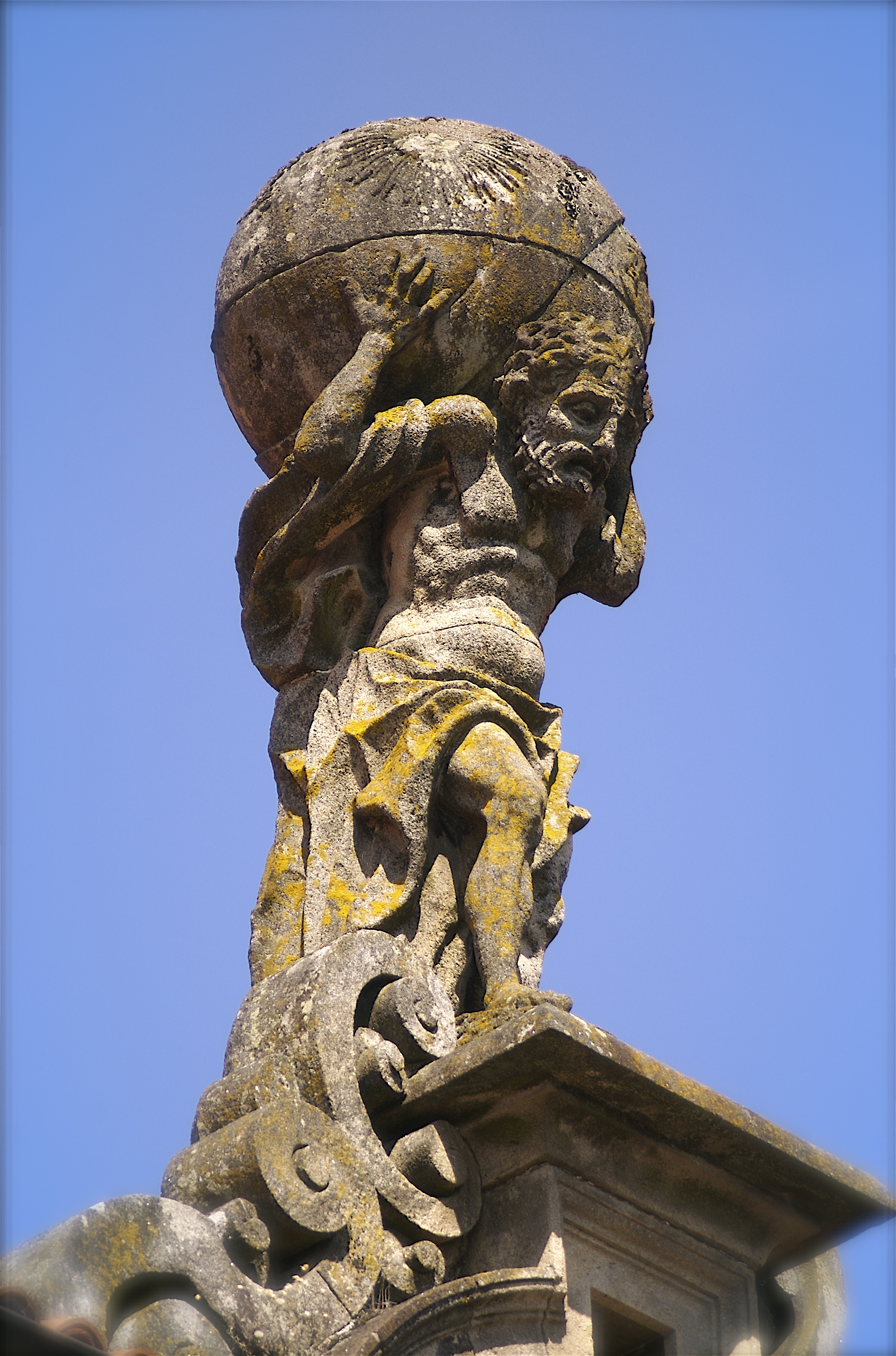 Atlas, pazo de Bendaña, praza do Toural, Santiago de Compostela